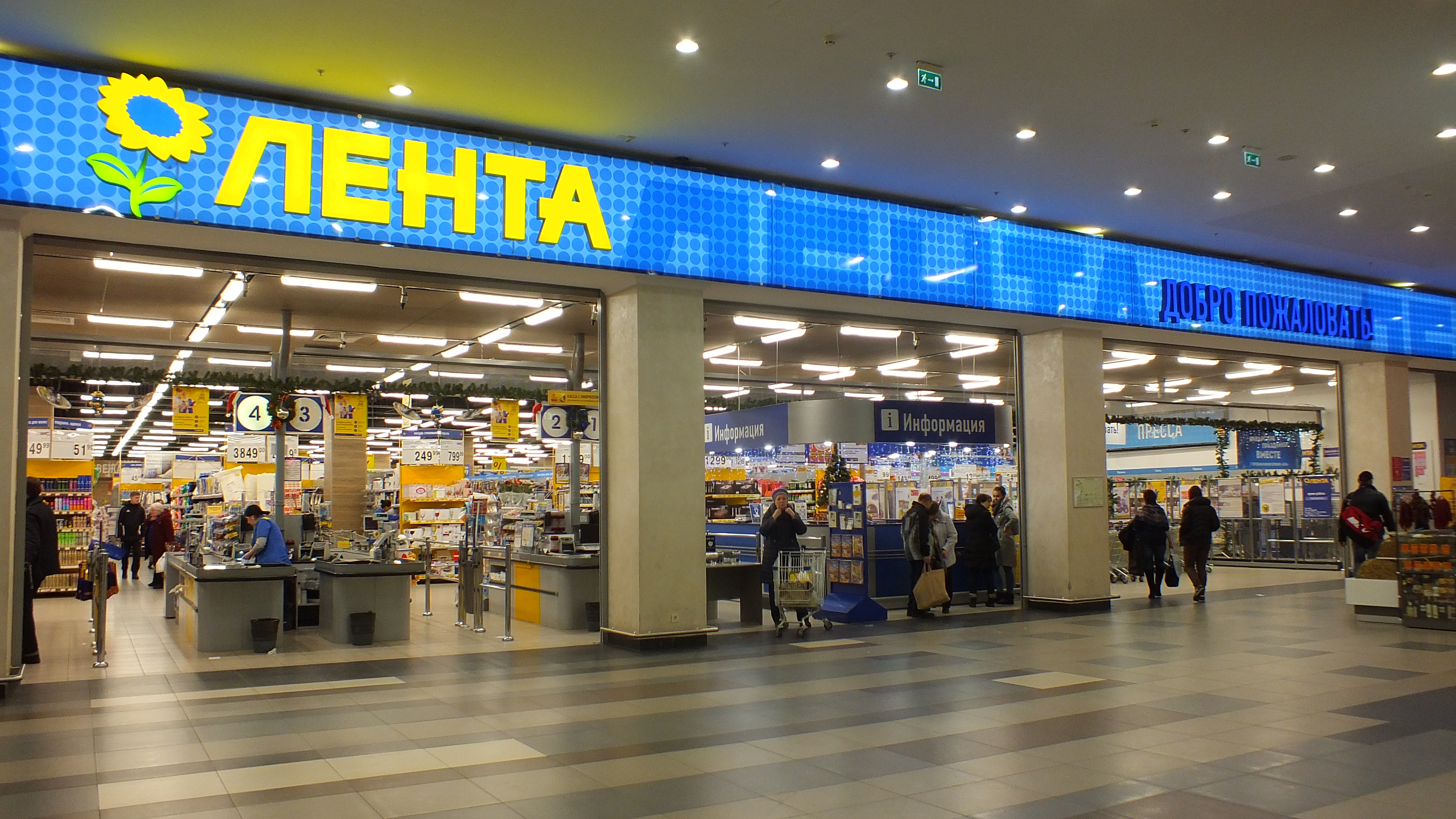 Интерьер гипермаркета «Лента» в Москве в торгово-развлекательном центре «Мозаика» в районе станции МЦК Дубровка 6 января 2018 года